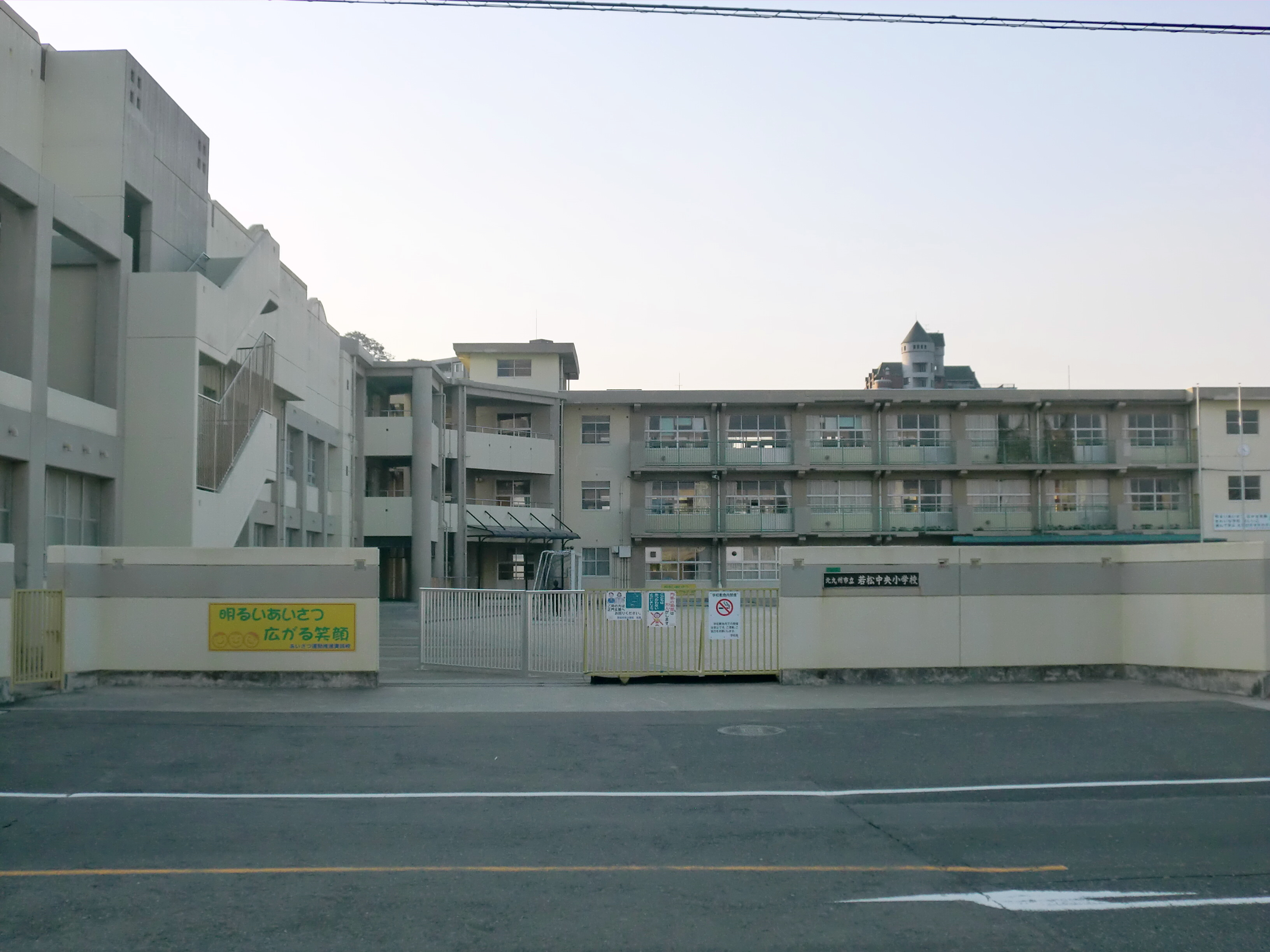 北九州市若松区にある若松中央（わかまつちゅうおう）小学校